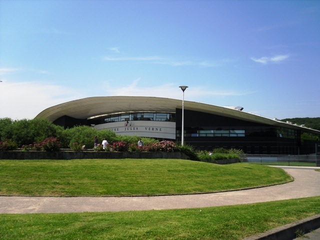 Le lycée Jules Verne de Limours (91)